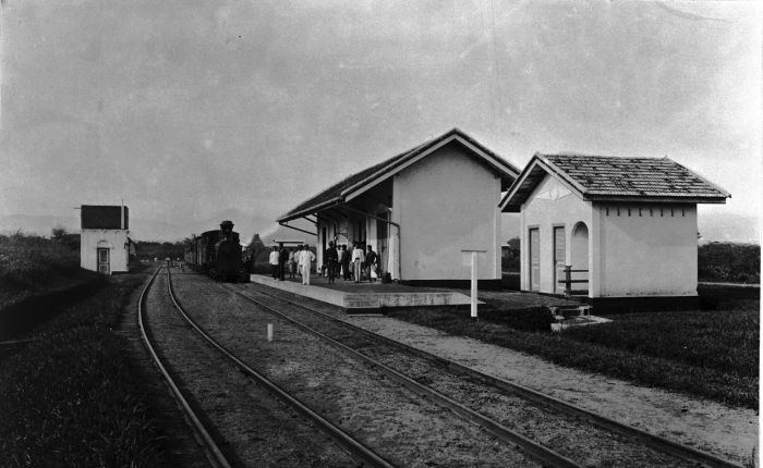 Foto. Het station Arnhemia aan de Deli-spoorlijn, oostkust Sumatra